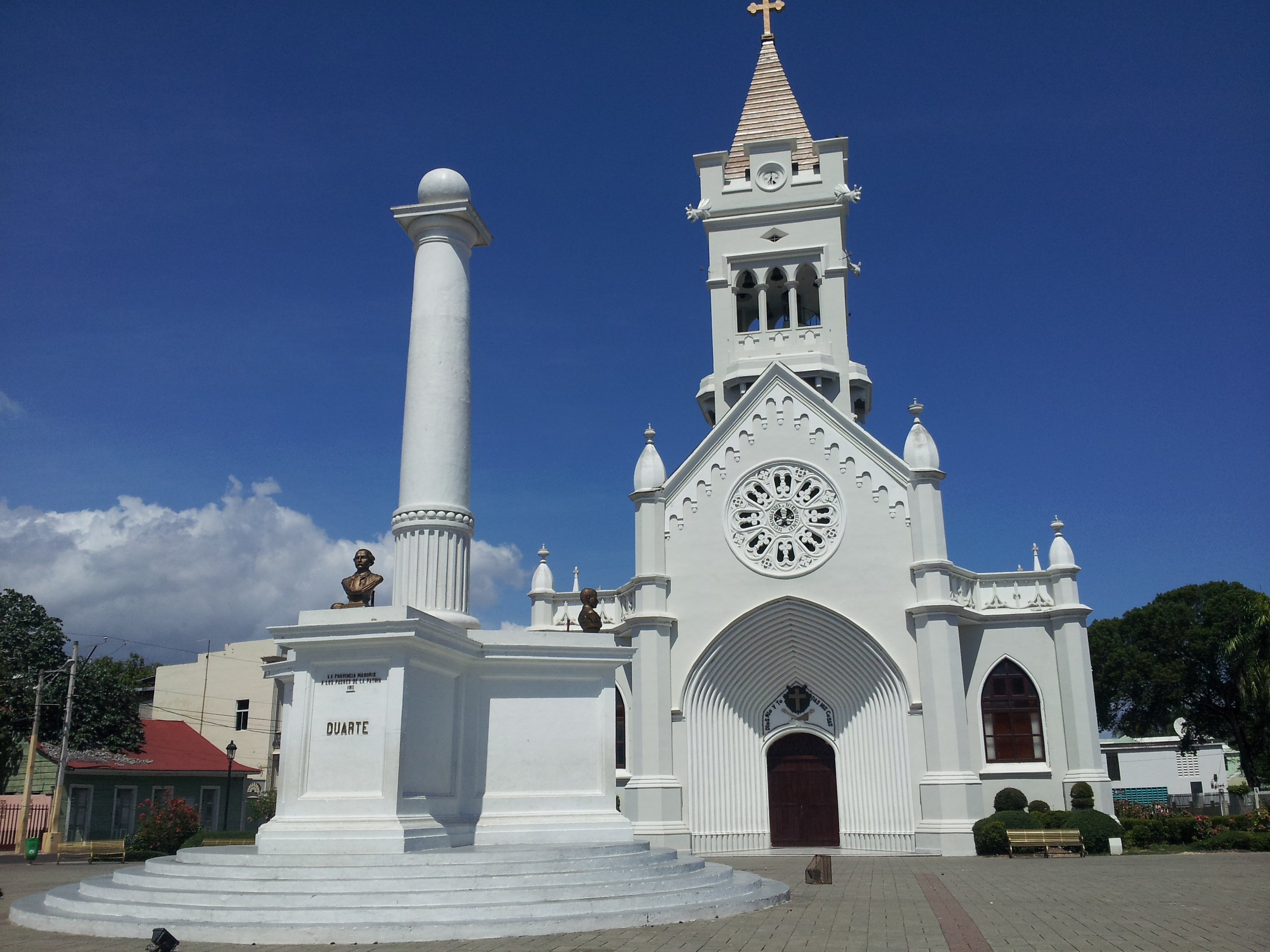 Catedral San Pedro Apostol